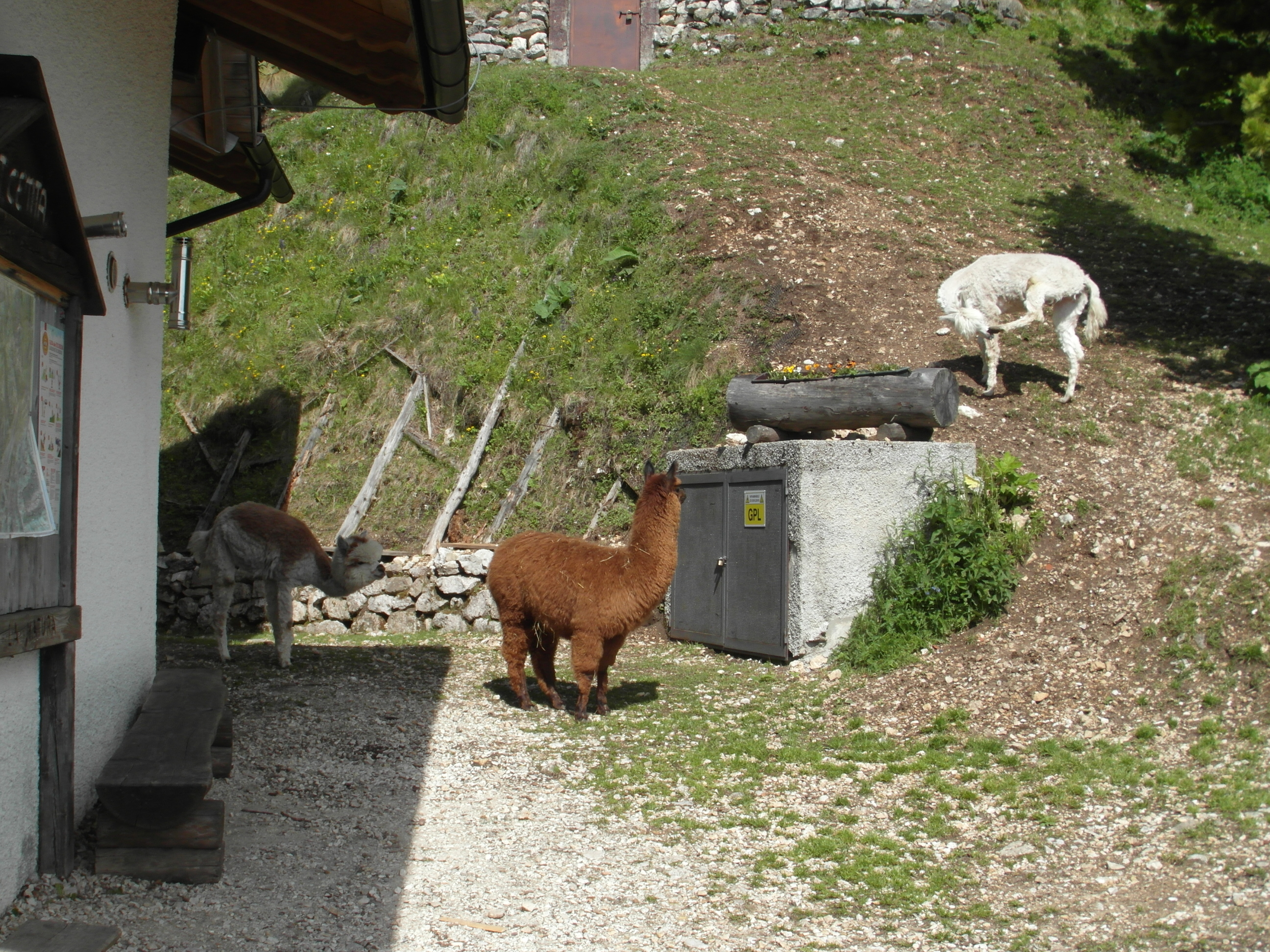 Vigolana - Rifugio Casarota - Esemplare di alpaca